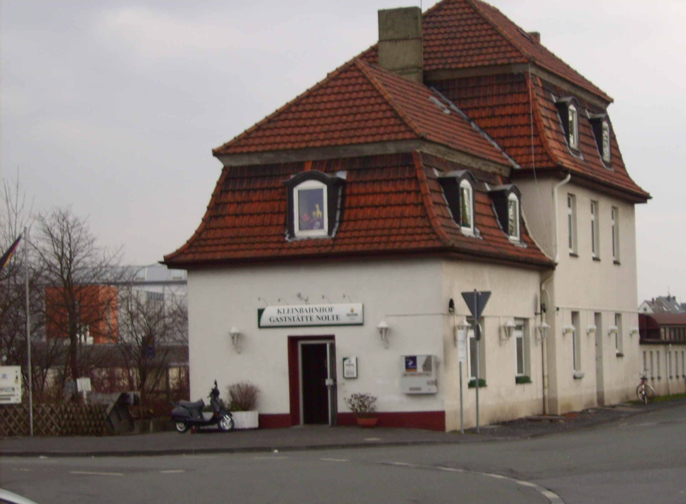 Ehemaliger Bahnhof der Kleinbahn Neheim-Hüsten